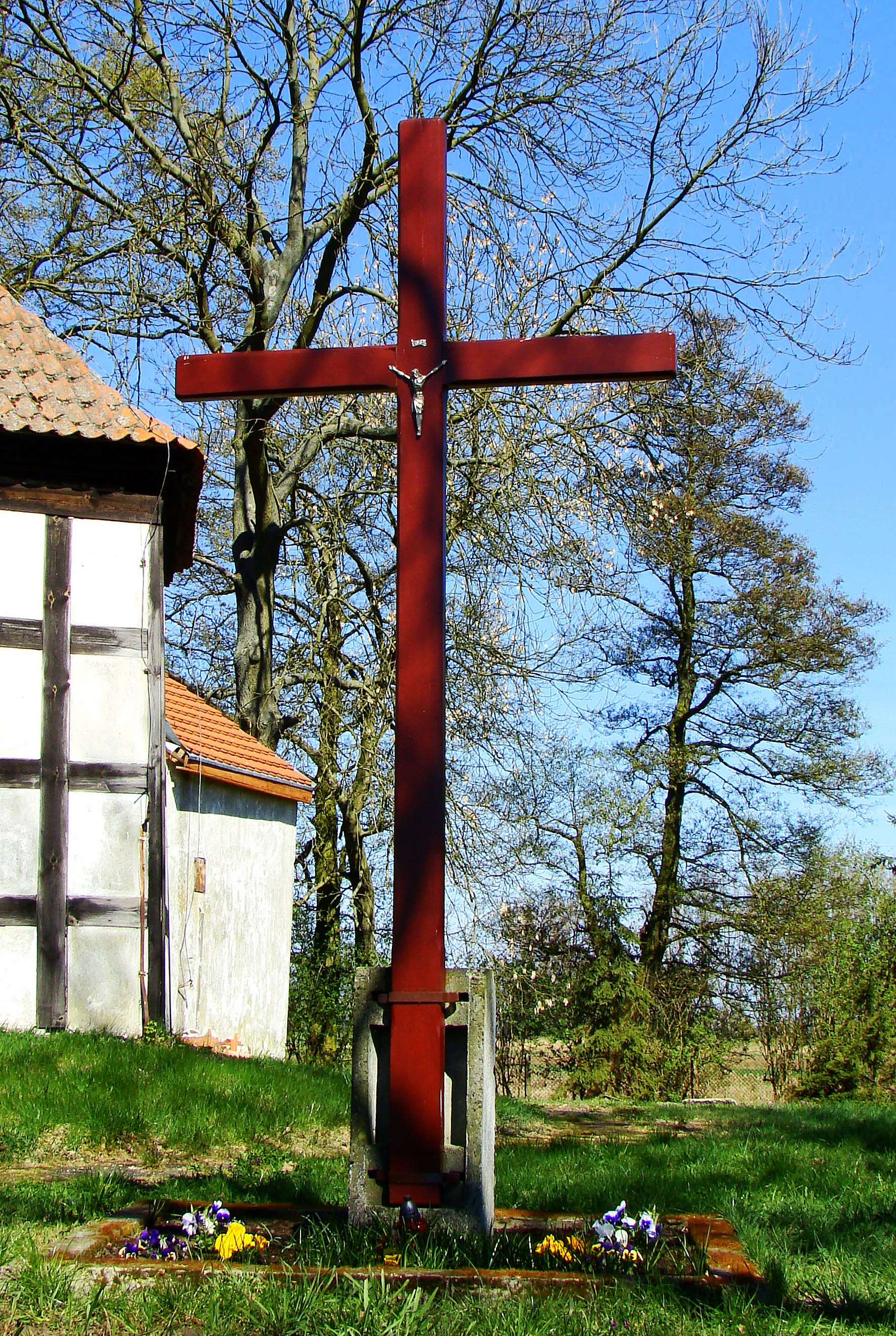 Kościół Matki Bożej Częstochowskiej w Warnołęce (krzyż przykościelny), Polska